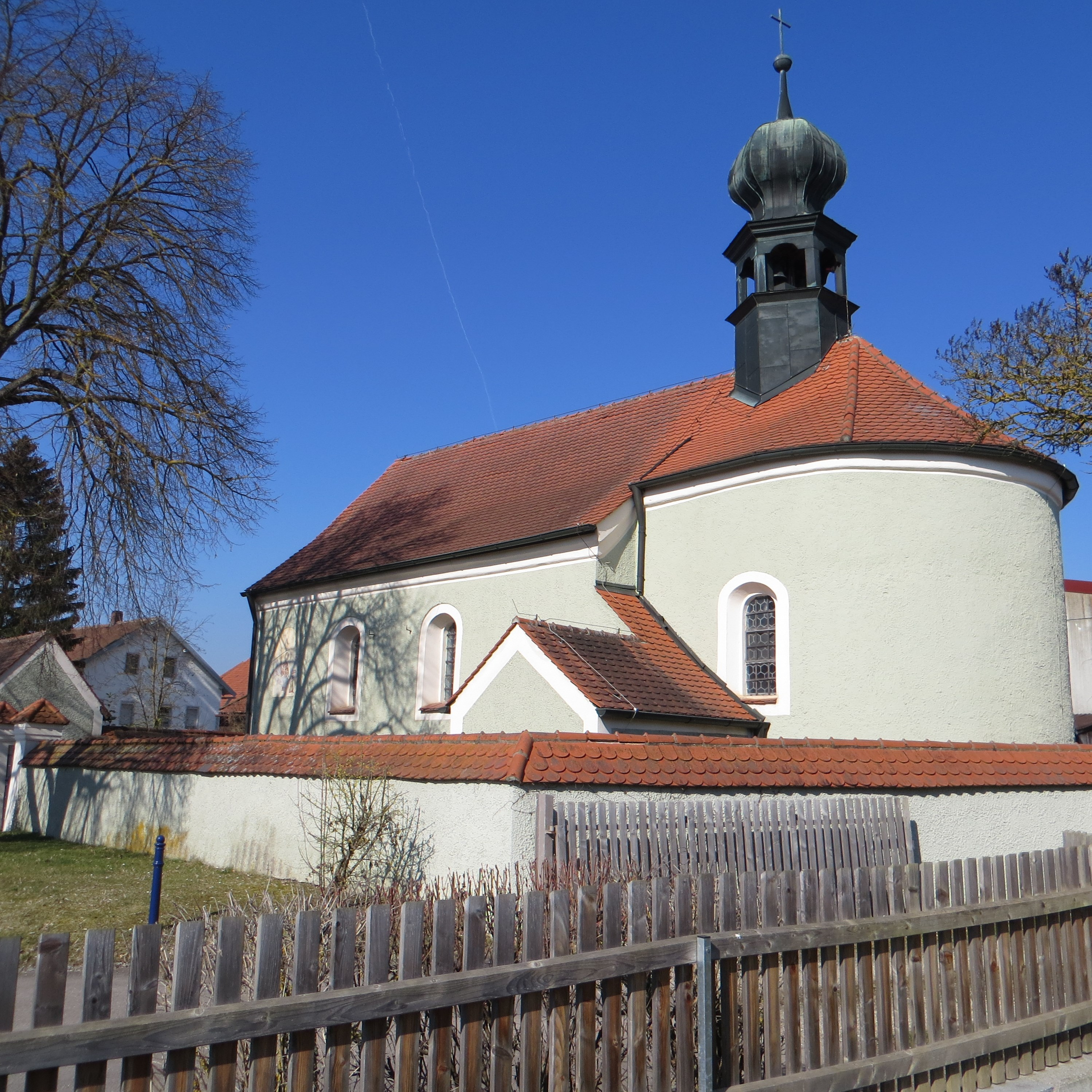 St. Martin - Piesenkofen